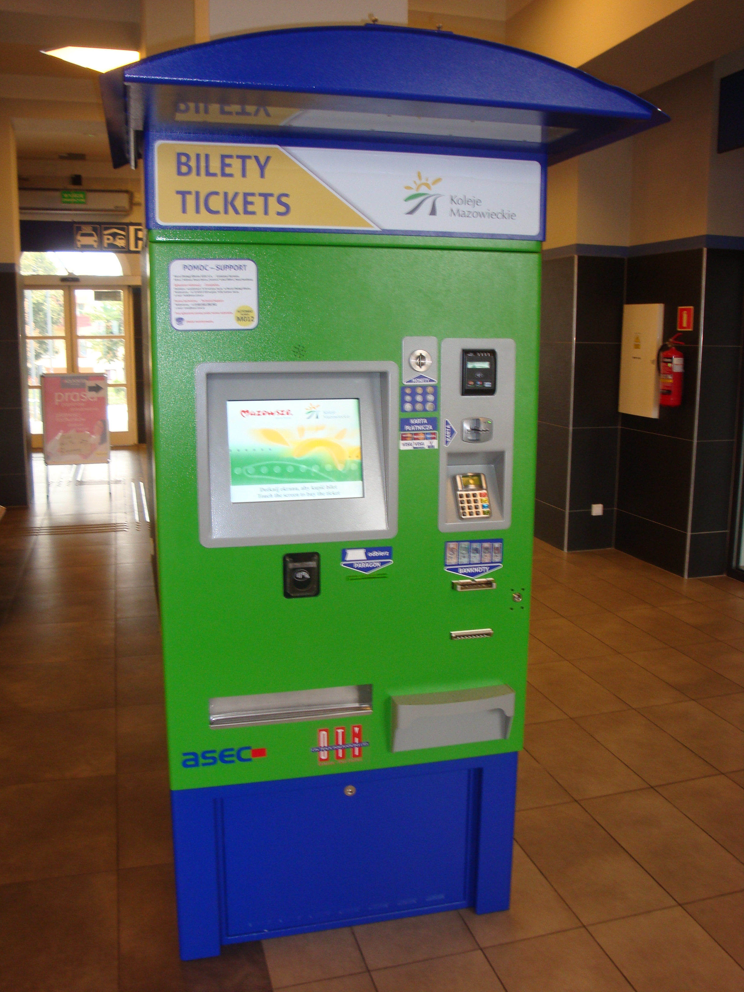 Biletomat Kolei Mazowieckich w Kutnie na dworcu kolejowym. This photo was taken during Railway Wikiexpedition 2013 set up by Wikimedia Polska Association.You can see all photographs in category Wikiekspedycja kolejowa 2013. English | polski | +/−